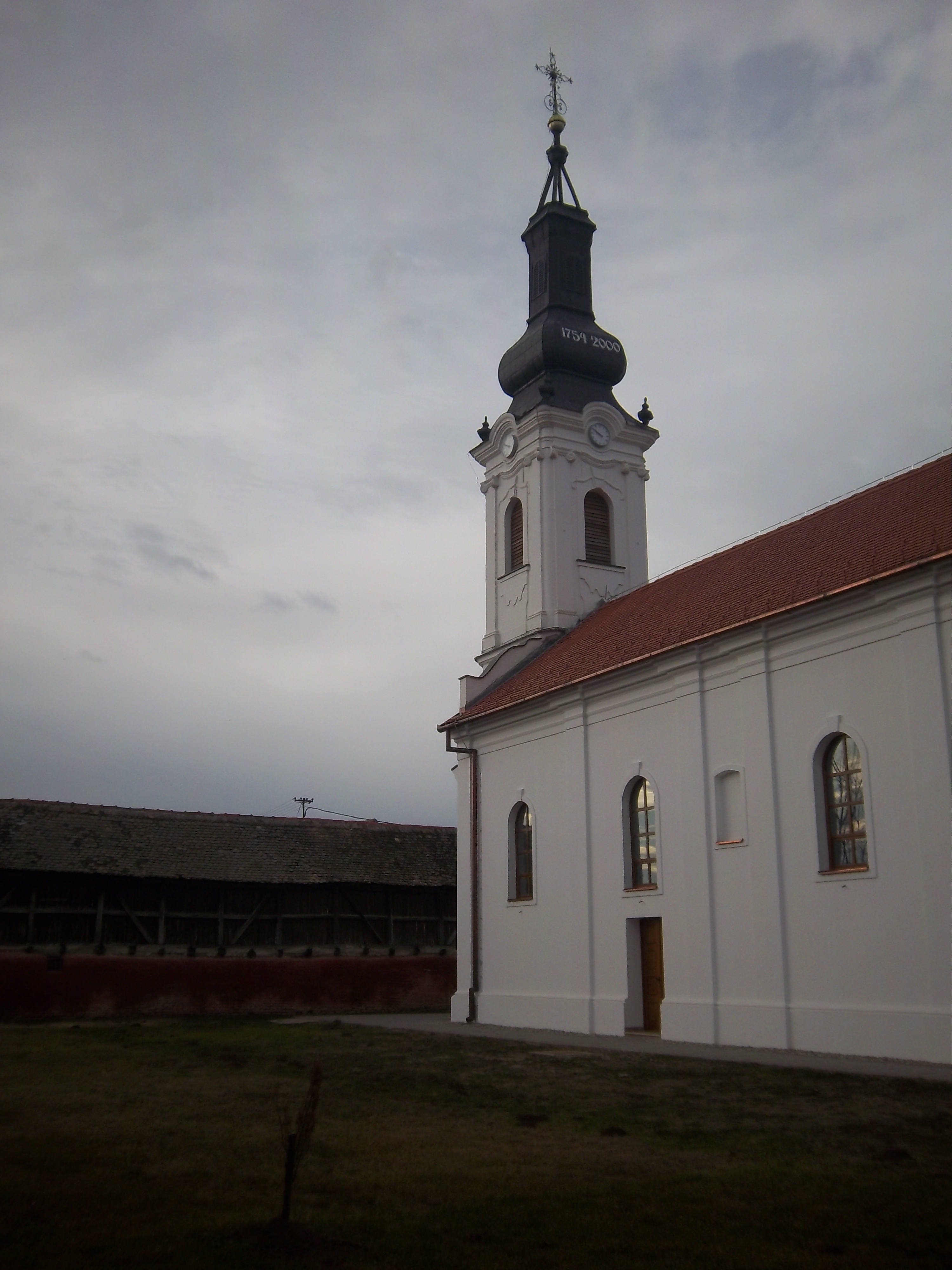 Pravoslavna crkva u Trpinji.